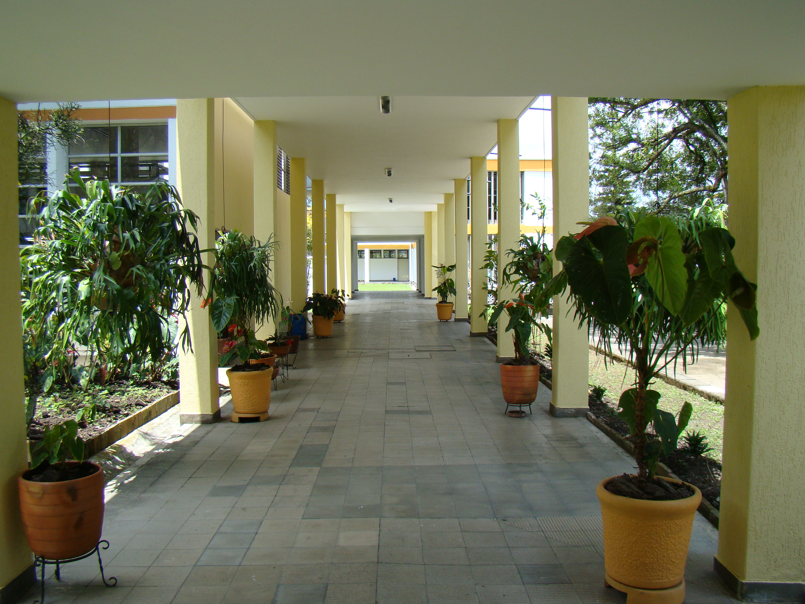 Corredor principal de acceso